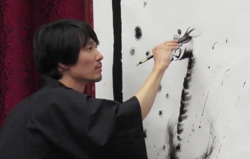 Muestra de pintura sumi-e a cargo de Mitsuru Nagata